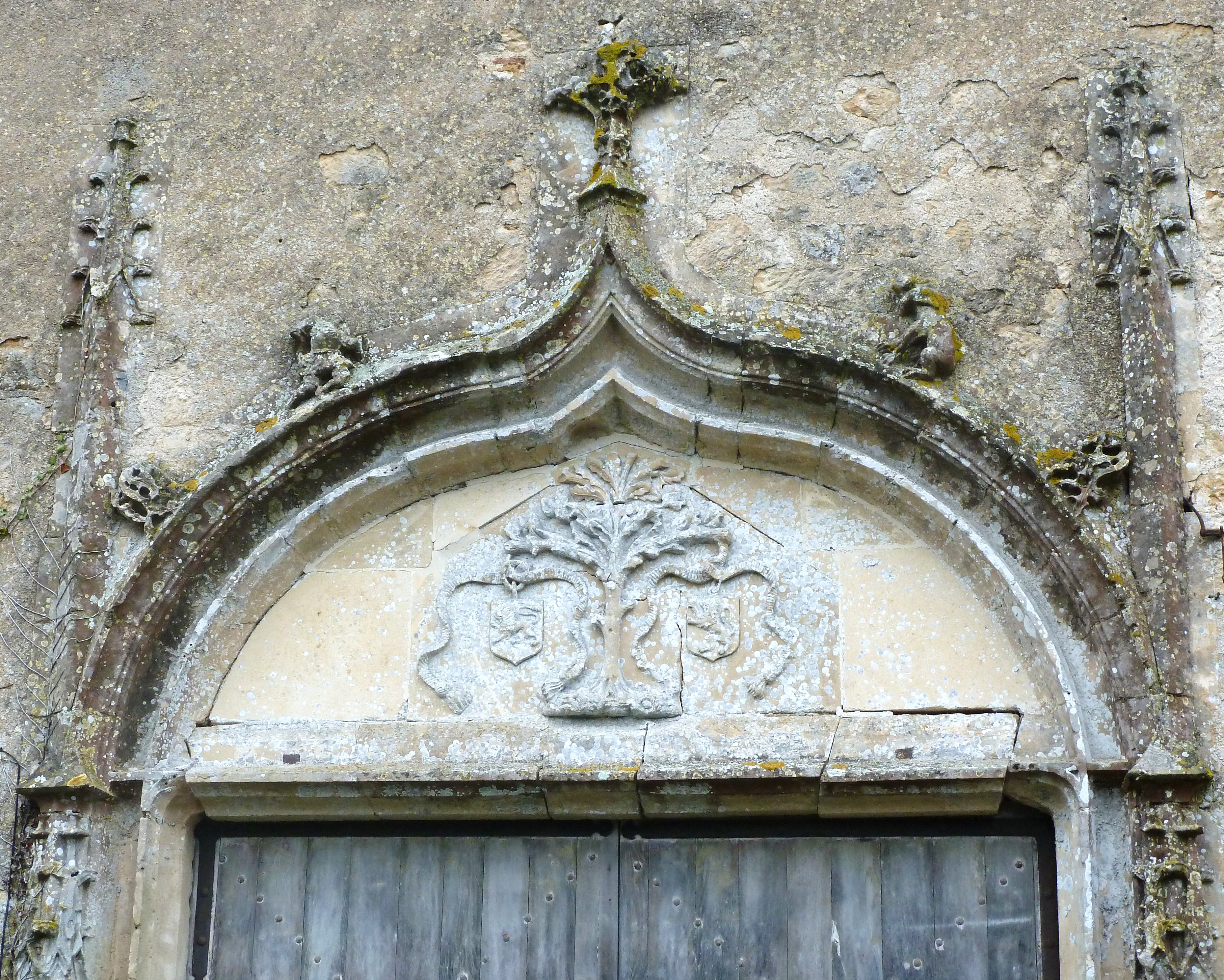 Château du bourg - Détail porche